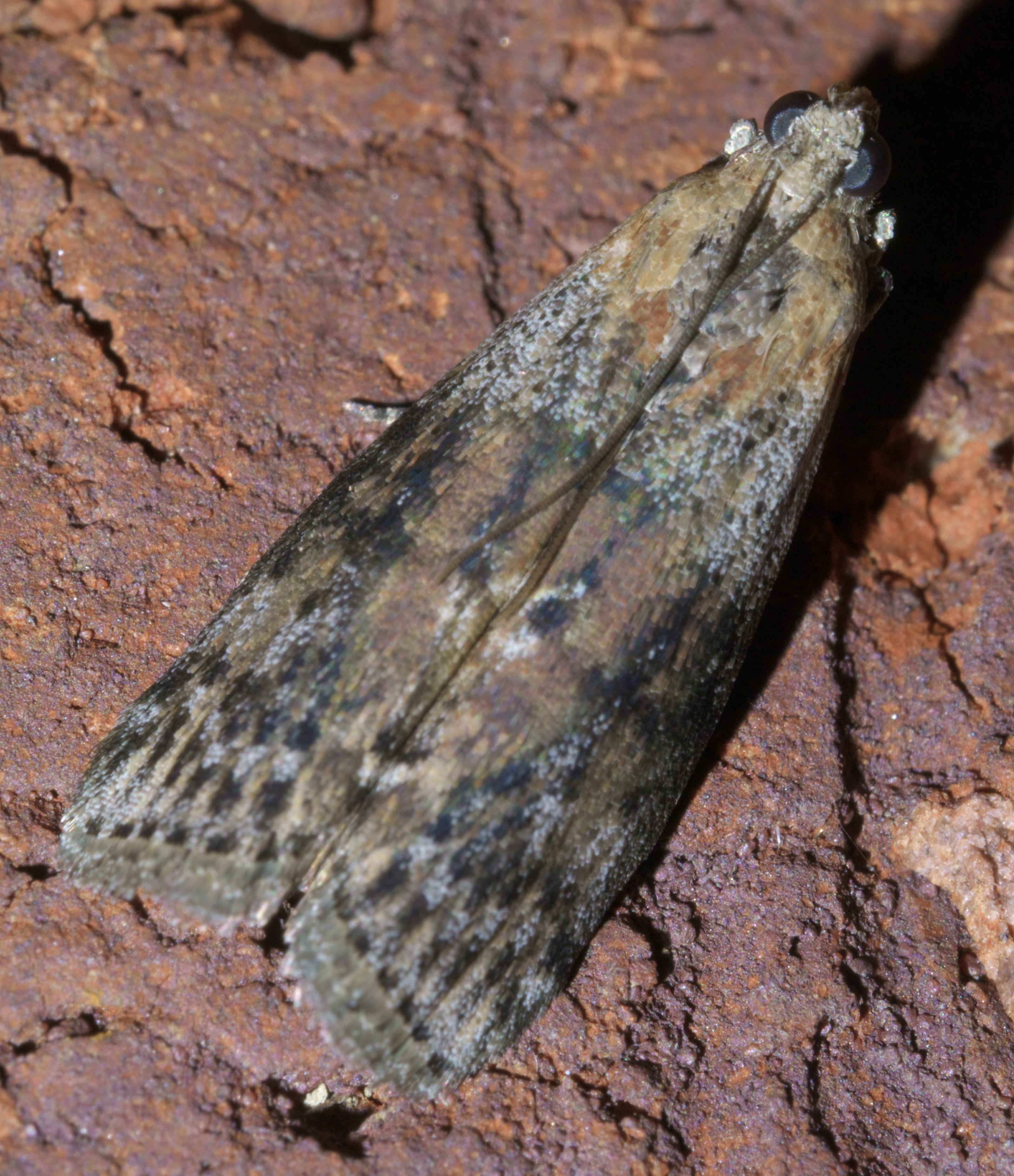 Sciota, Family: Pyralid Moths, Sciota virgatella or celtidella, Size: 12.7 mm